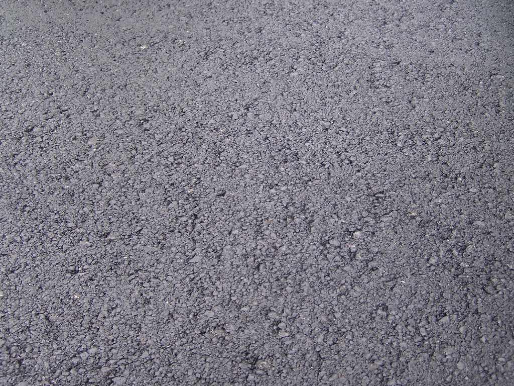 Abbildung einer Asphalttragschicht